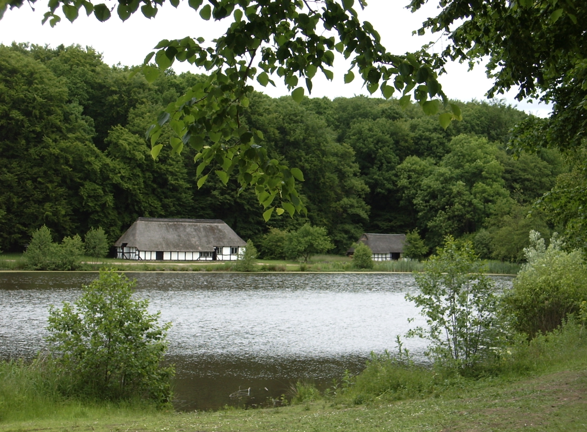 Zwei von vielen Bauernhäusern im großzügig angelegten Schleswig-Holsteinischen Freilichtmuseum in Molfsee: die Schusterkate aus Alt-Duvenstedt, 1700, Kr. RD-ECK (links) und die Weberkate aus Holzbunge, 1760, Kreis RD-ECK (rechts). Autor: Stefanie Elder, Hagen H. Schulz